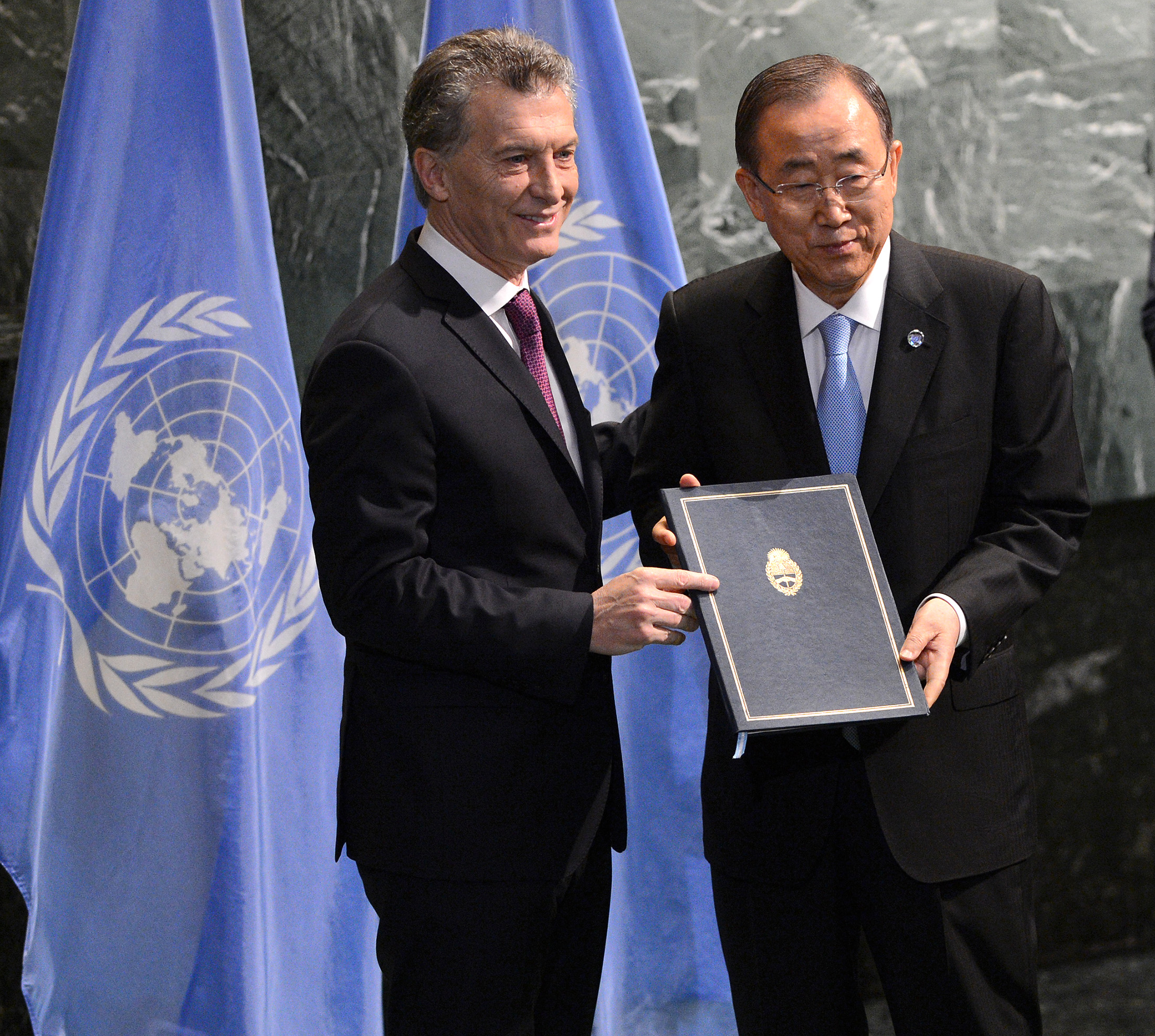 El presidente argentino Mauricio Macri le entrega al Secretario general de la ONU Ban Ki-moon la adhesión de Argentina al acuerdo de París.